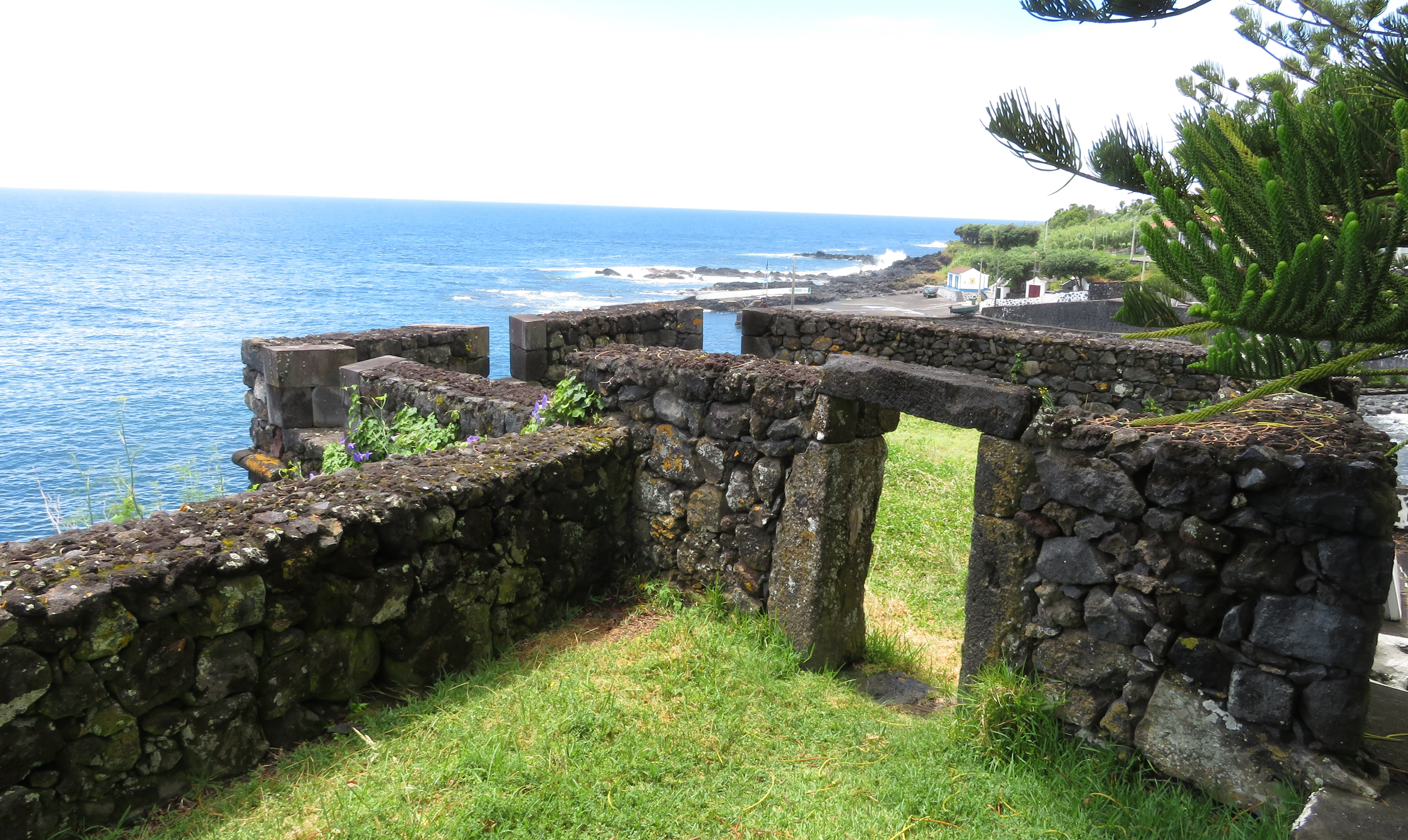 Festung in Manadas, Insel Sao Jorge, Azoren, Portugal